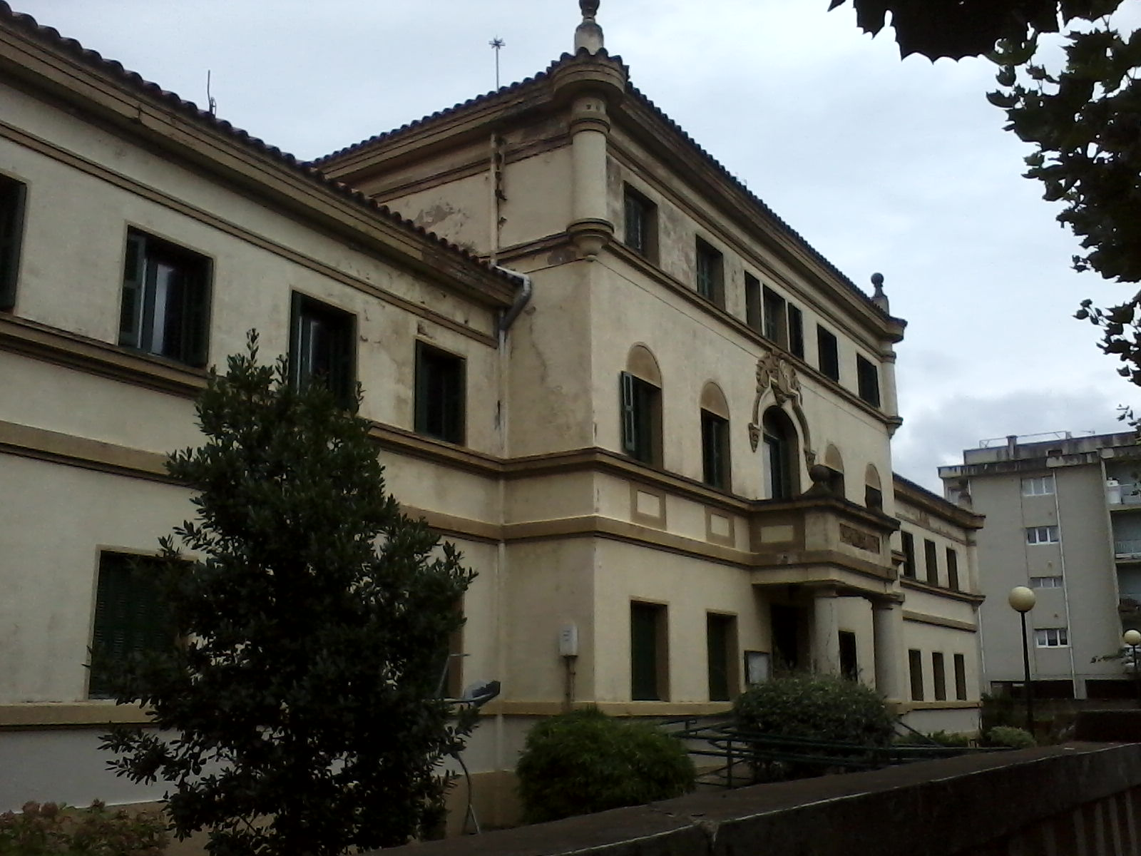 Ebro Etxea. Actual albergue para peregrinos del Camino de Santiago. Sólo abierto en época estival.